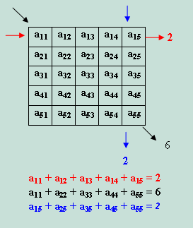 Komputertomográfia egyenletrendszere